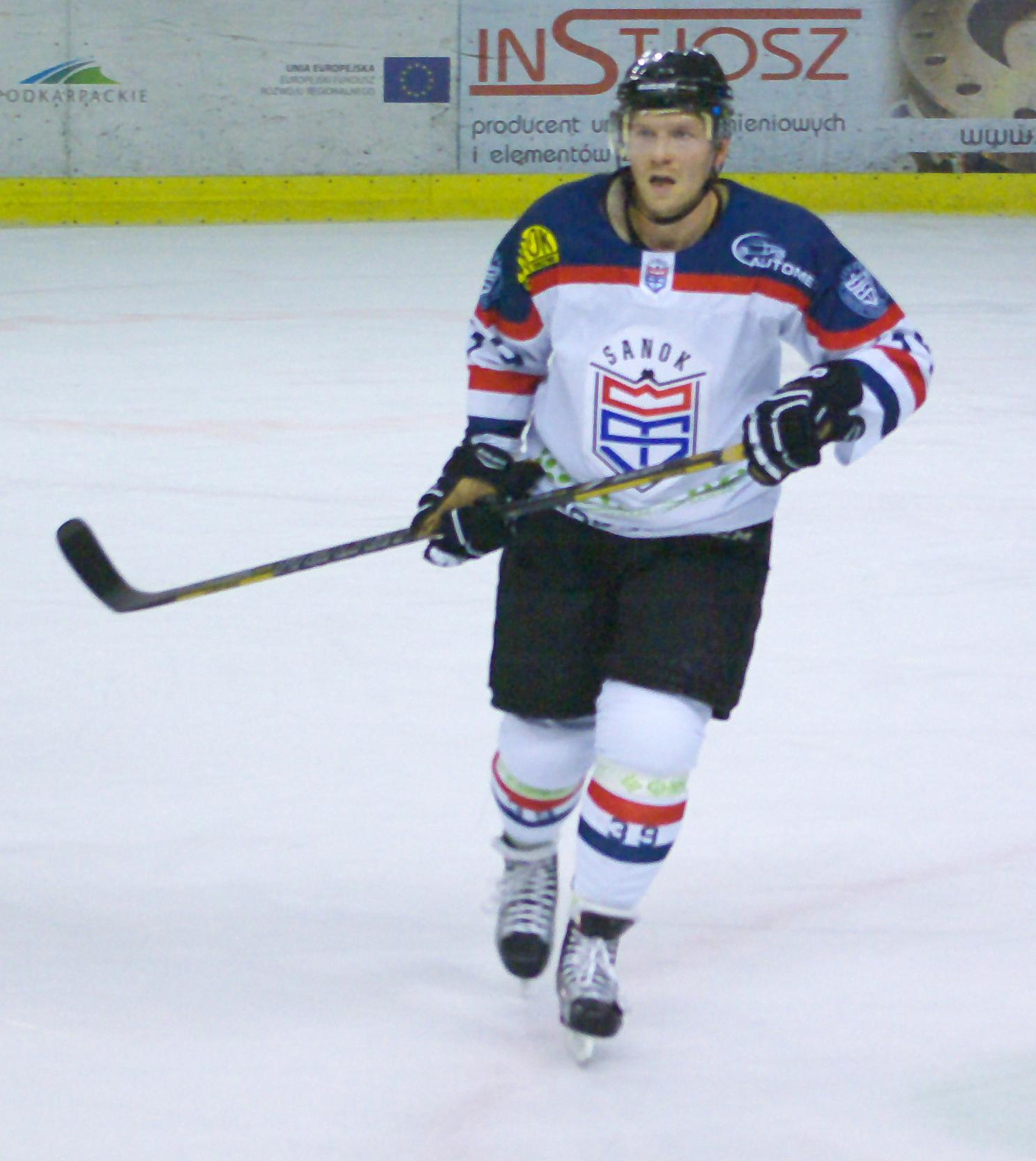 Toni Dahlman w barwach STS Sanok w meczu przeciw Podhalu Nowy Targ (23 października 2015)